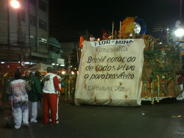 Carro abre-alas da Flor da Mina, 2011.